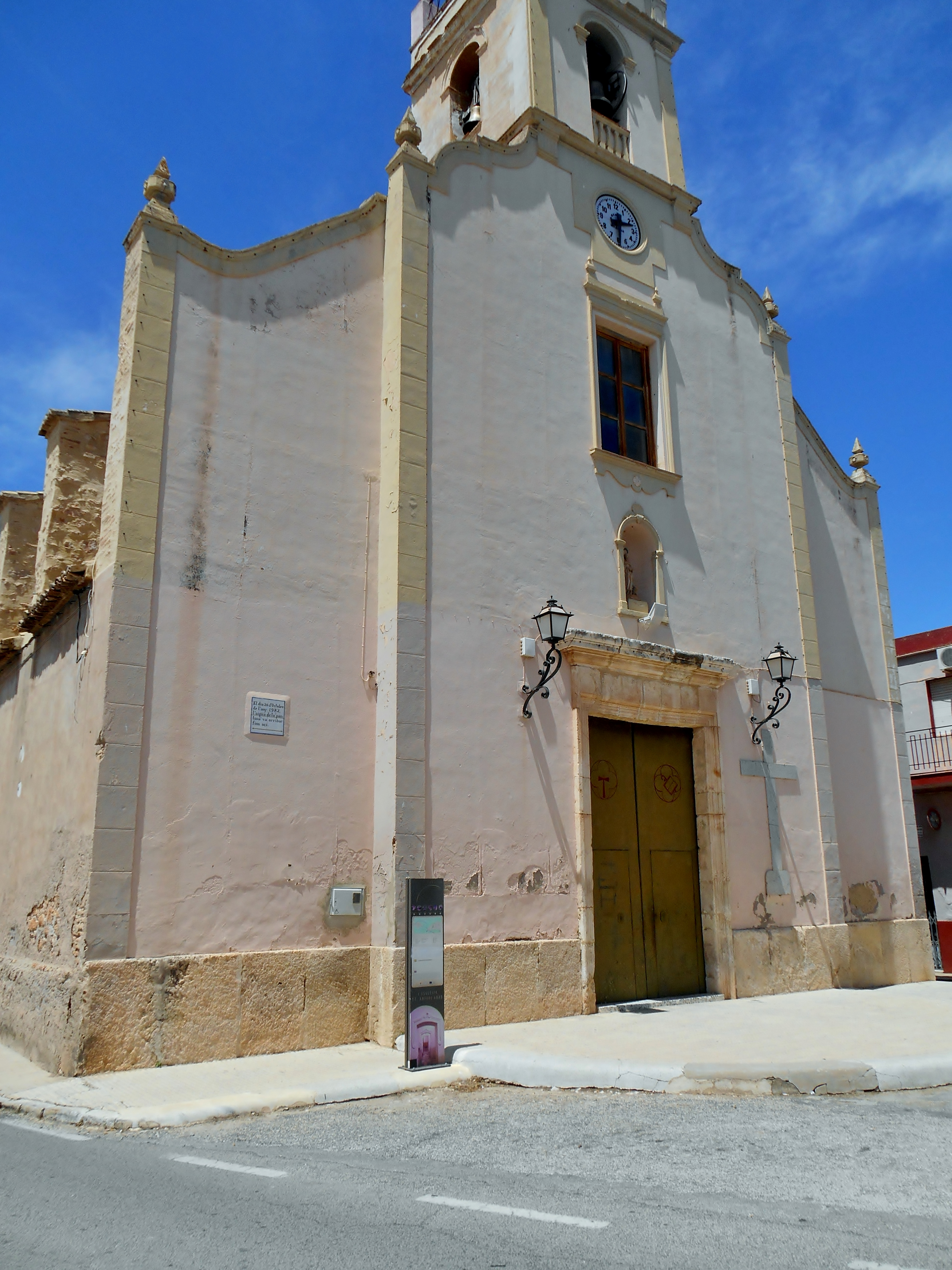 Gavarda. 20.130-001.